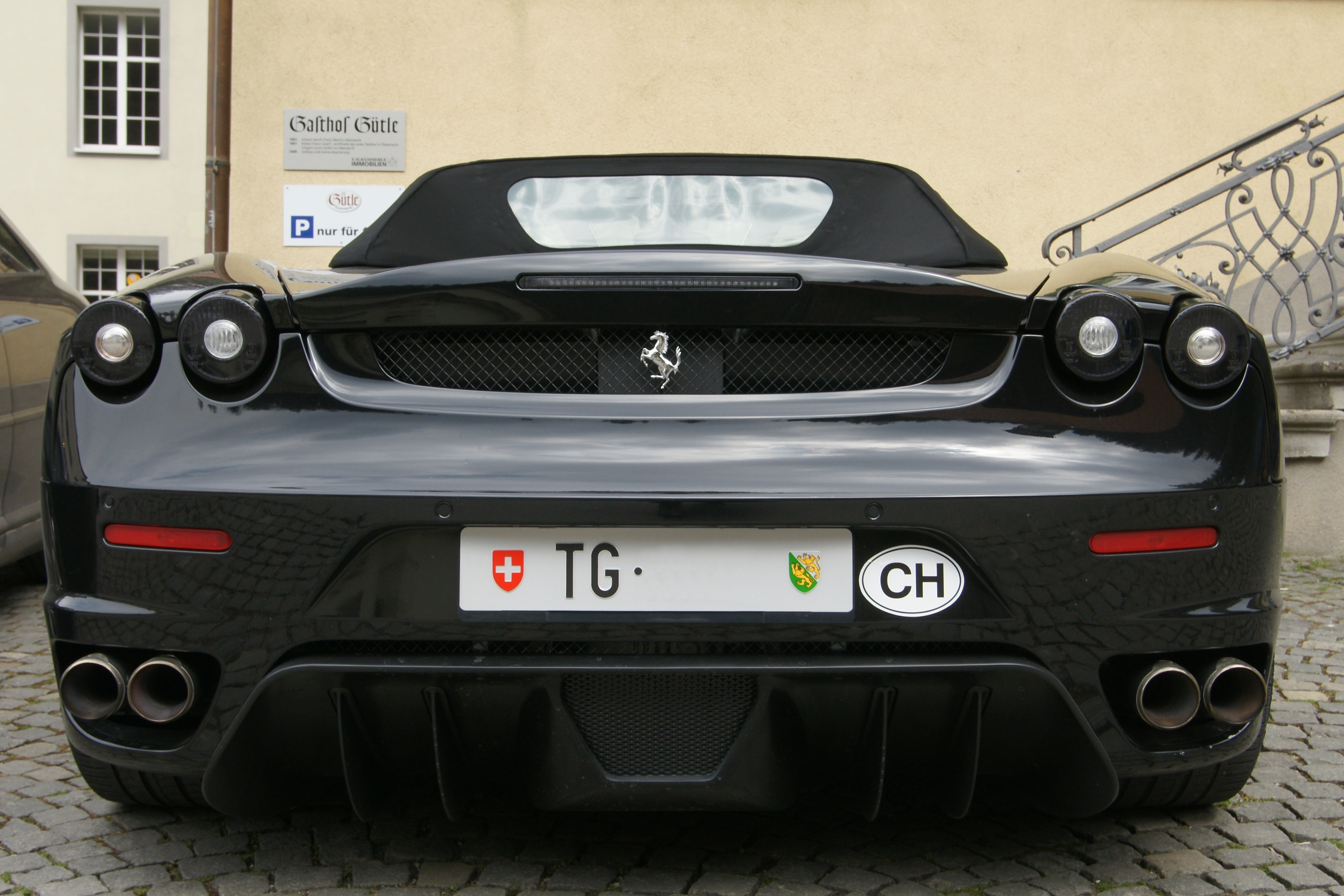 Ferrari F430 im Gütle in Dornbirn.